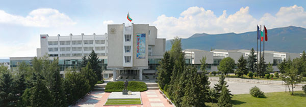 УНСС - панорама